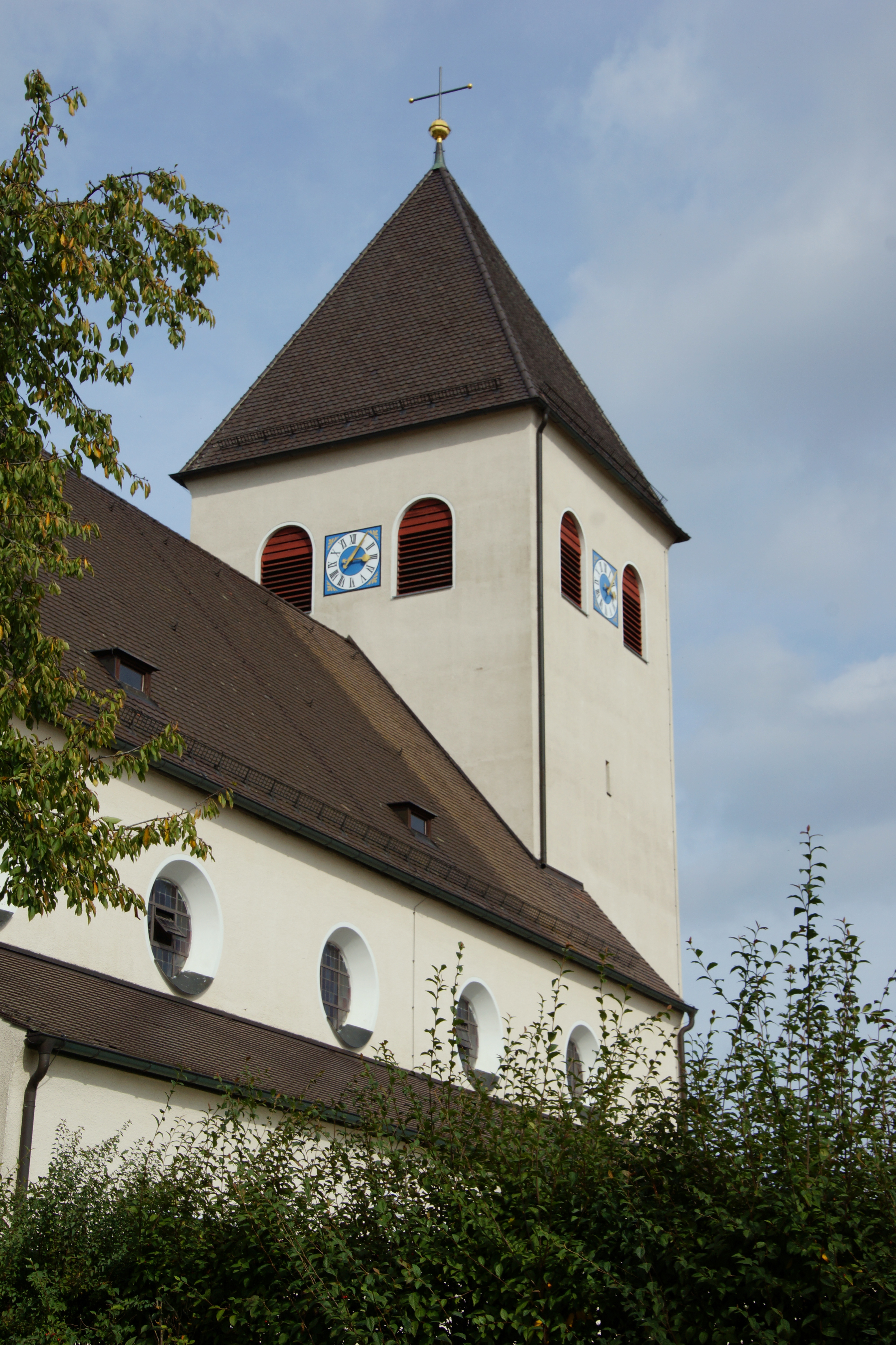 Die katholische Pfarrkirche Mariä Aufnahme in Daßwang bei Seubersdorf